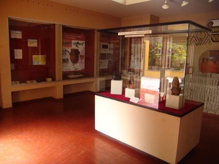 Sala de exposición de Huaca Pucllana.